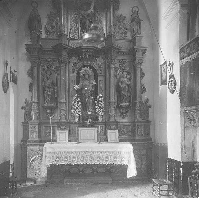 Altar del Roser a l ' interior de l'església del Molar. Josep Salvany i Blanch (1923)